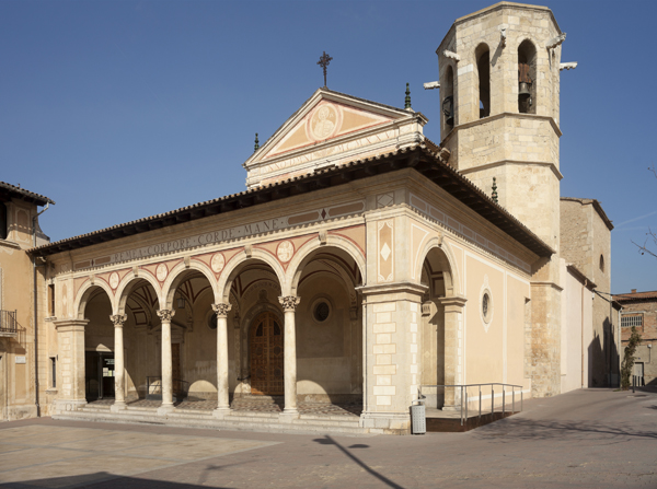 Església parroquial de Sant Sadurní (Sant Sadurní d'Anoia) Object location41° 25′ 28.7″ N, 1° 47′ 22.99″ E